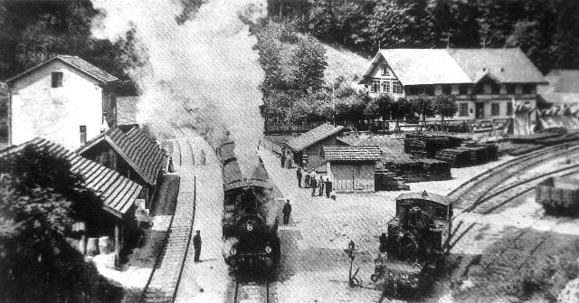 Der von La Chaux-de-Fonds in Les Convers eingefahrene Zug ist nach Neuenburg unterwegs. Die letzten Wagen werden abgekuppelt und von der rechts wartenden Lok der Jura–Bern–Luzern übernommen, welche dann die Fahrt nach Biel antritt. Zur Vereinfachung des Betriebs nahm die Jura–Bern–Luzern 1888 eine eigene Strecke mit dem Crosettes-Tunnel zwischen Le Creux und La Chaux-de-Fonds in Betrieb. Die Strecke zwischen Le Creux und Les Convers wurde nach einer Betriebszeit von nur 14 Jahren wieder stillgelegt.